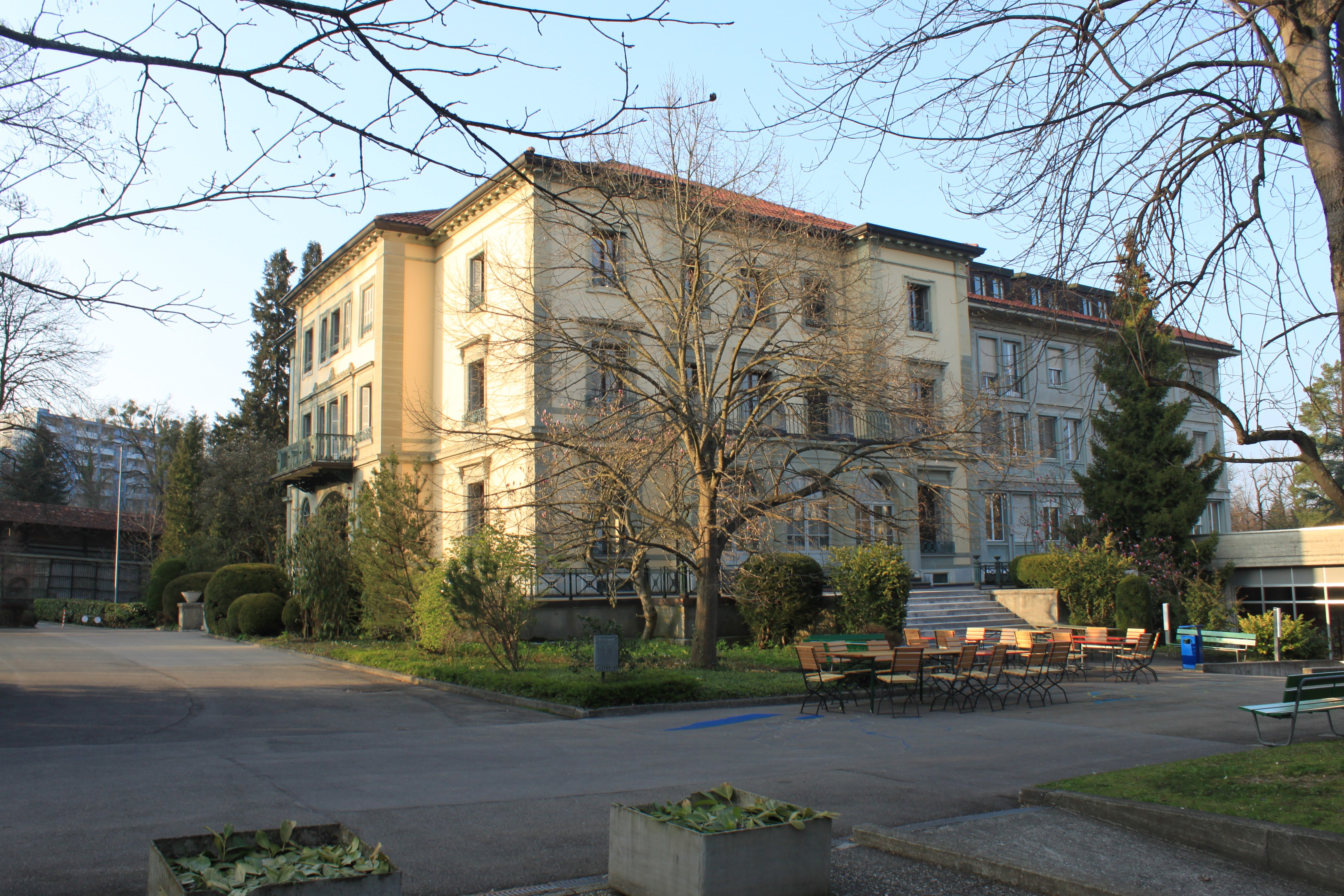 Neben der sogenannten Villa befindet sich ein Pausenplatz (vor der Cafeteria).